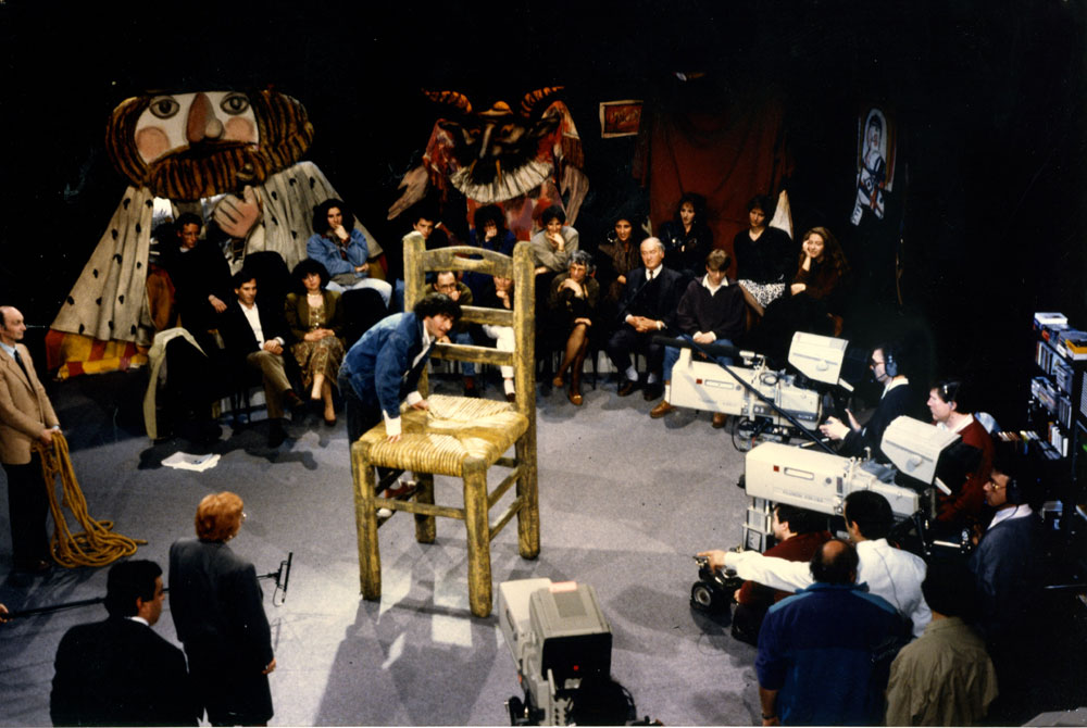 regia psicodramma